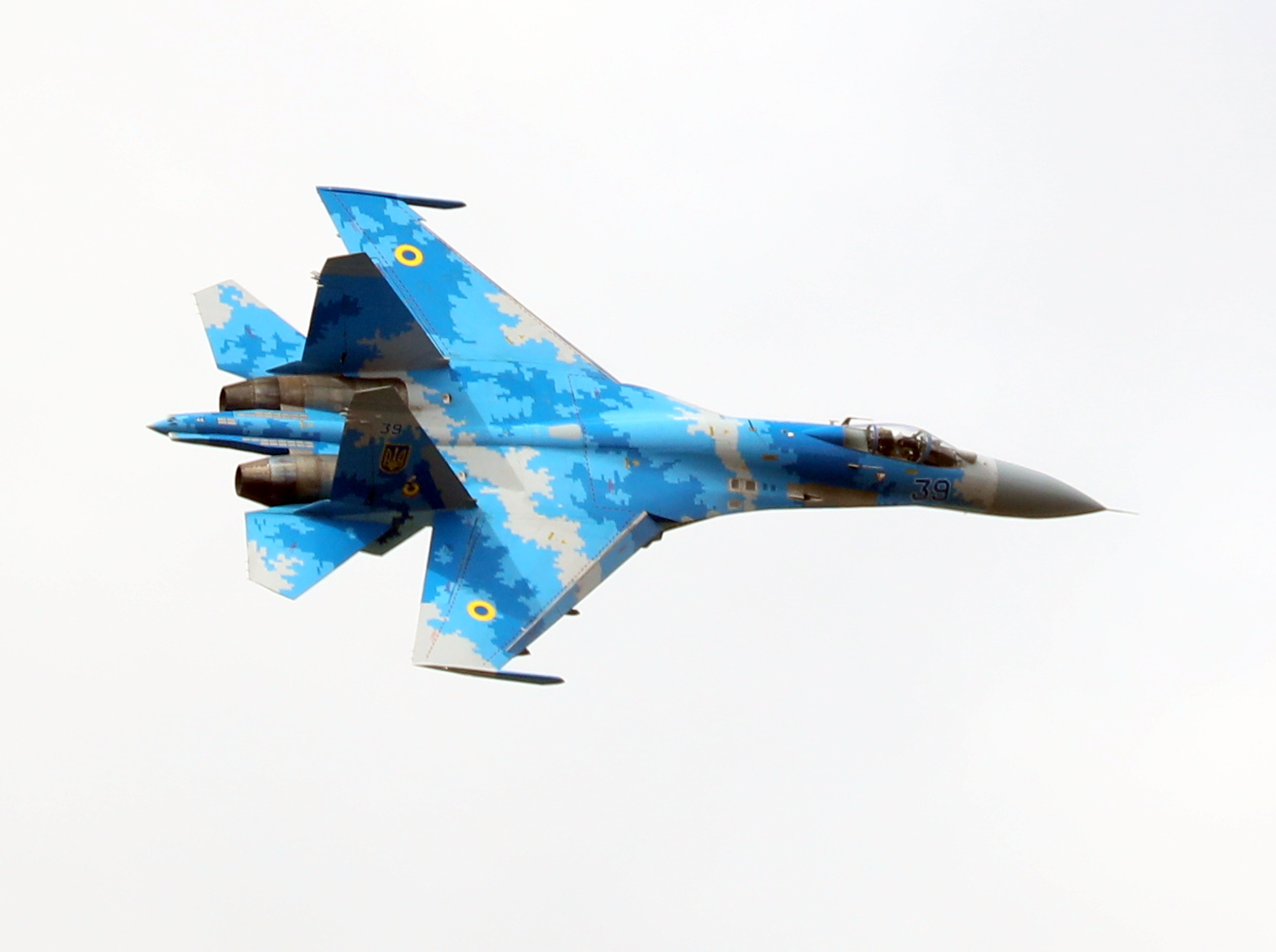 1P4A7703-001